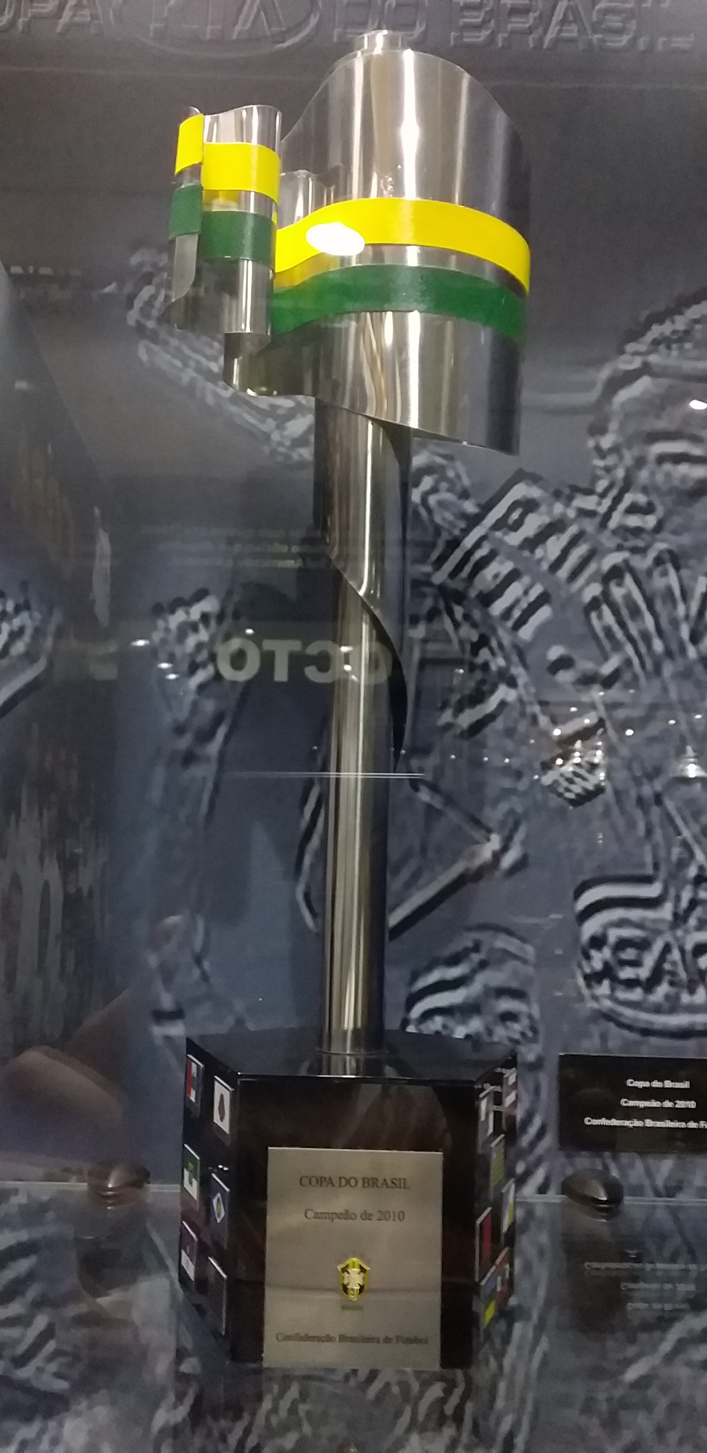 Troféu da Copa do Brasil de 2010 conquistado pelo Santos FC exposto no Memorial das Conquistas